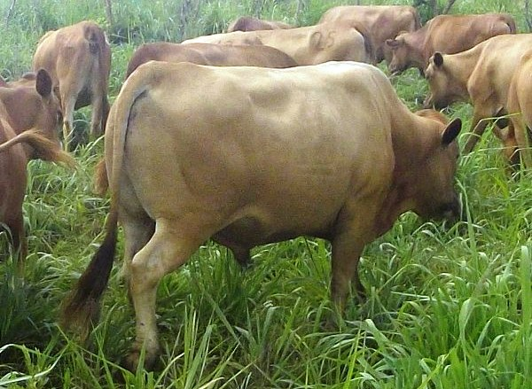 Boeuf de 4 ans, Sogenac (ex-JVL)